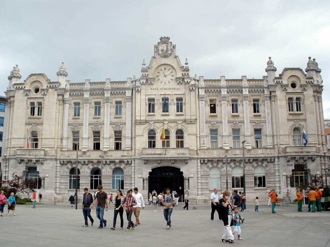 Ayuntamiento de Santander